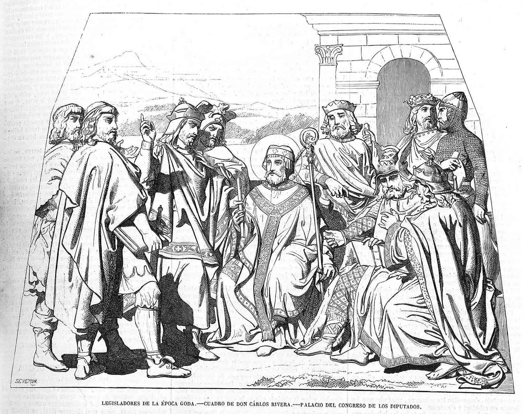 Legisladores de la época goda. Cuadro de don Carlos Rivera. Palacio del Congreso de los Diputados.